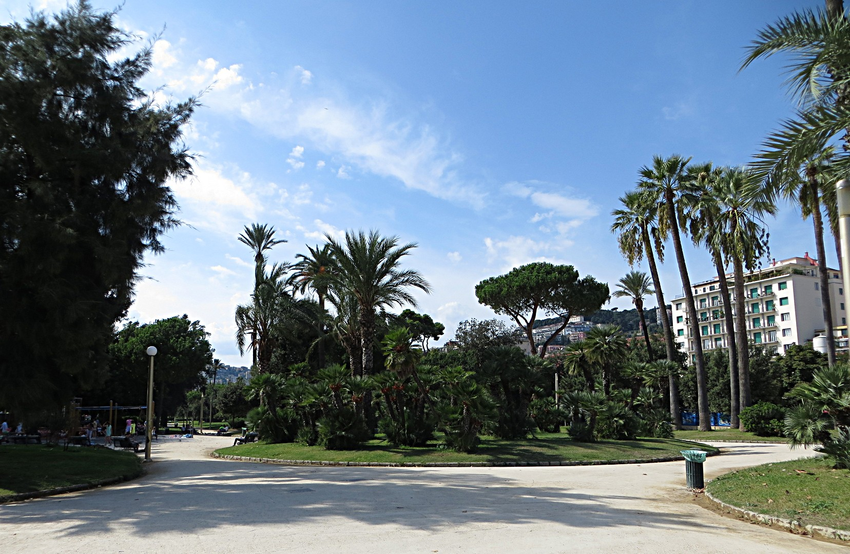 Villa Comunale